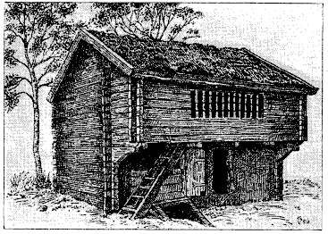 Fadebur fra Åbro, Sverige